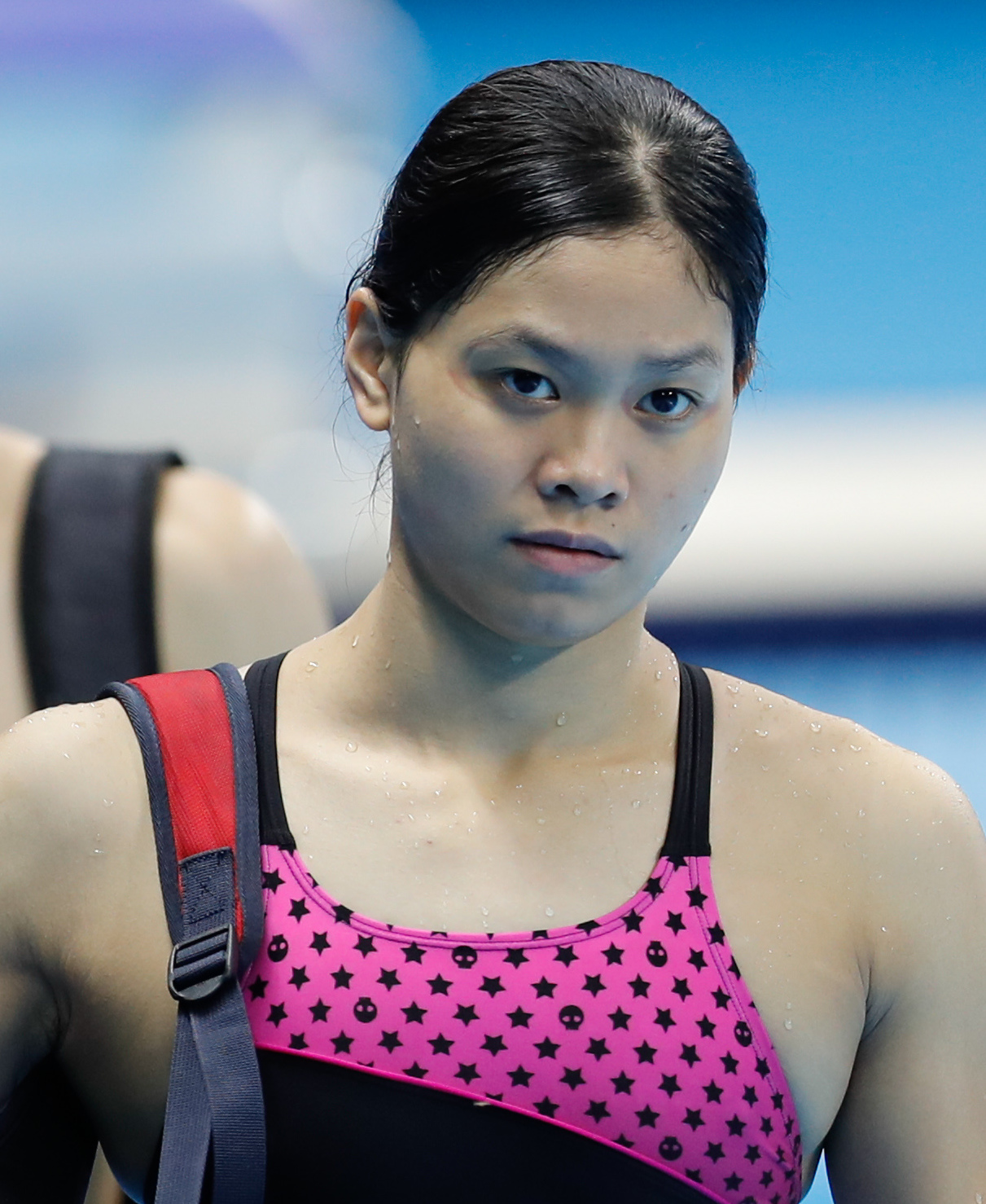 Rio de Janeiro - Atletas da natação treinam na piscina do Estádio Aquático, no Parque Olímpico da Barra da Tijuca (Fernando Frazão/Agência Brasil)